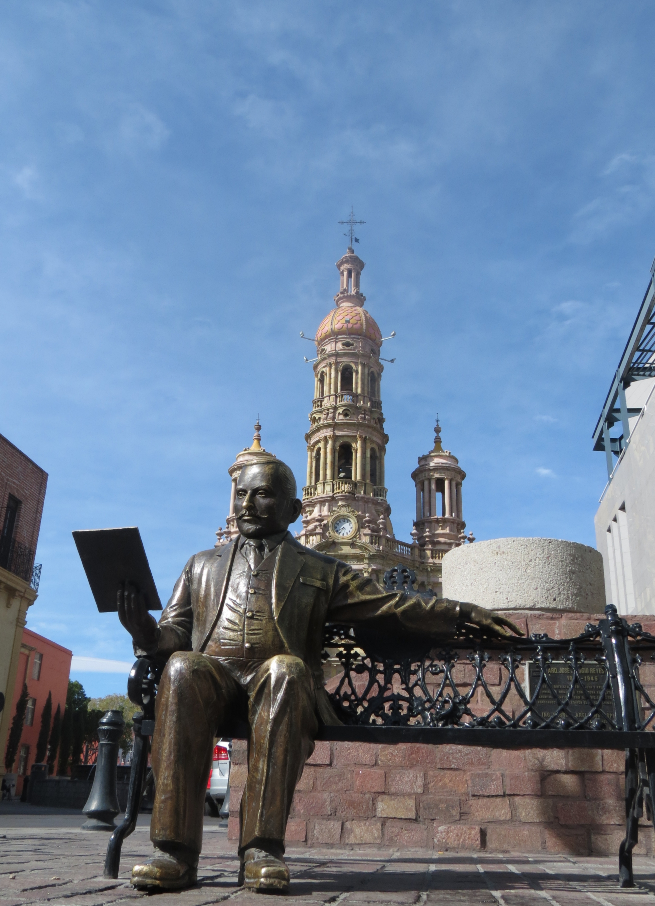 Esta escultura en bronce se encuentra en Aguascalientes, en la calla Ignacio Zaragoza, justo enfrente de una de las construcciones más sobresalientes de Refugio Reyes, la Iglesia de San Antonio.